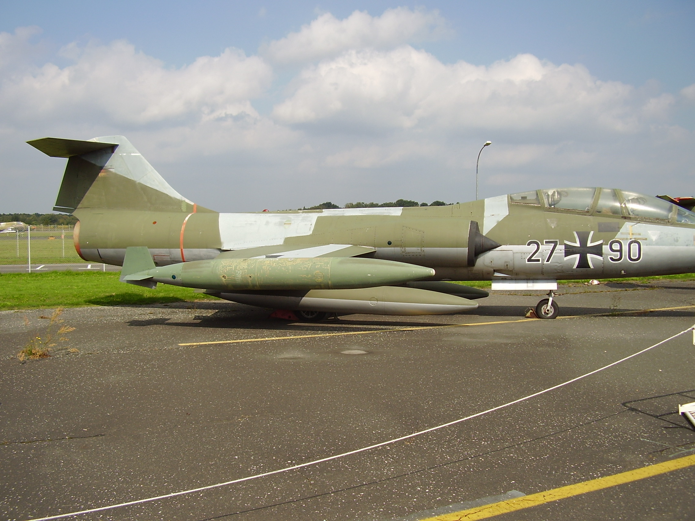 Luftwaffenmuseum der Bundeswehr; Airforce Museum of the Bundeswehr; Berlin-Gatow, Starfighter TF-104G